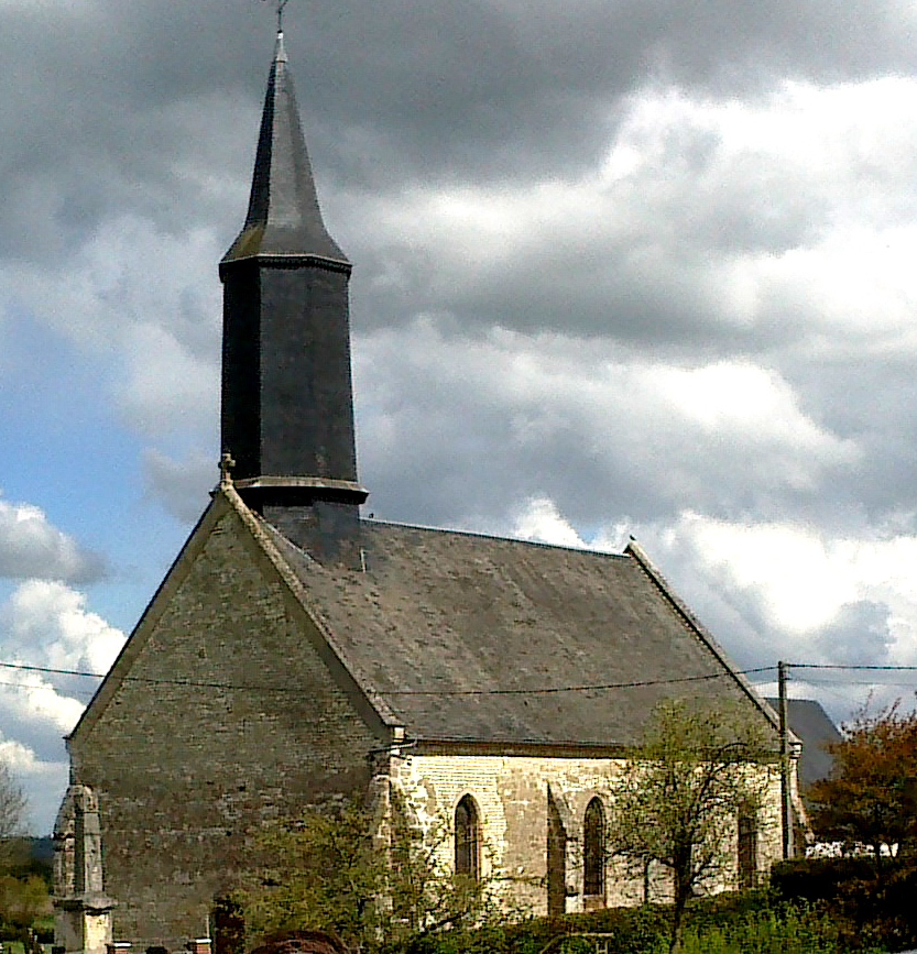 Centre de Mesangueville Église paroissiale